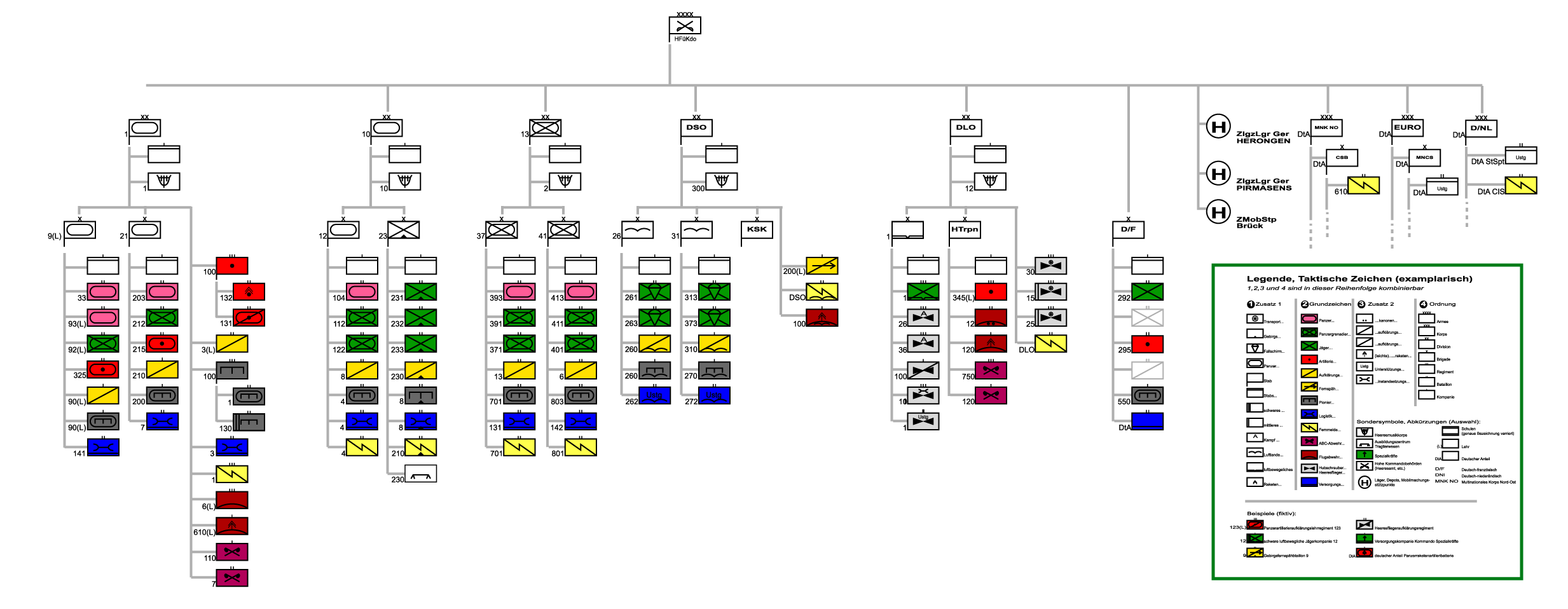 Gliederung Heeresführungskommando des deutschen Heeres. Zielstruktur 2010.